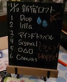 amiinaセトリボード(20151112(1))